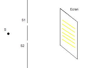 Montage permettant d'oberver des franges d'interférences avec des fentes de Young.